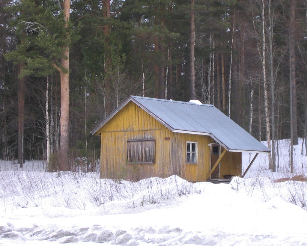 Tikkala sidetrack, old building near tracks, Tohmajarvi, Finland. Tikkalan sivuraiteella Tohmajärvellä oleva rakennus, Photo M. Passinen